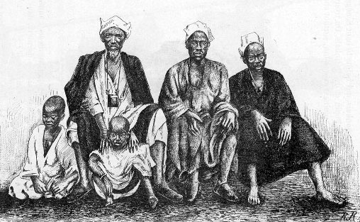 Groupe de Bambaras du haut Sénégal (illustration dans Colonel Frey Côte occidentale d'Afrique, 1890, Fig.49 p.87 :] [Cote : Réserve A 200 386]